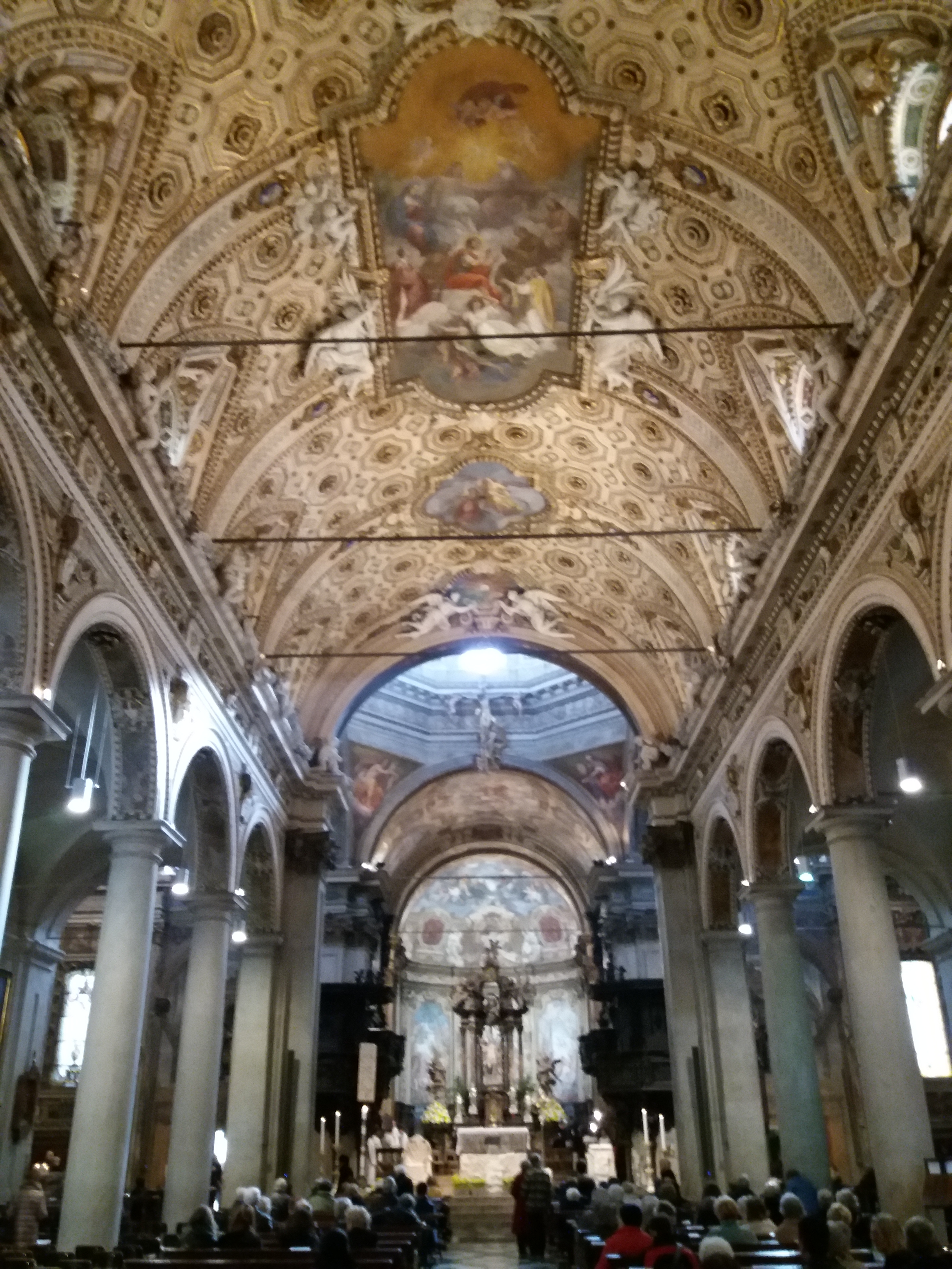 Varese: Basilica San Vittore Martire - Interno